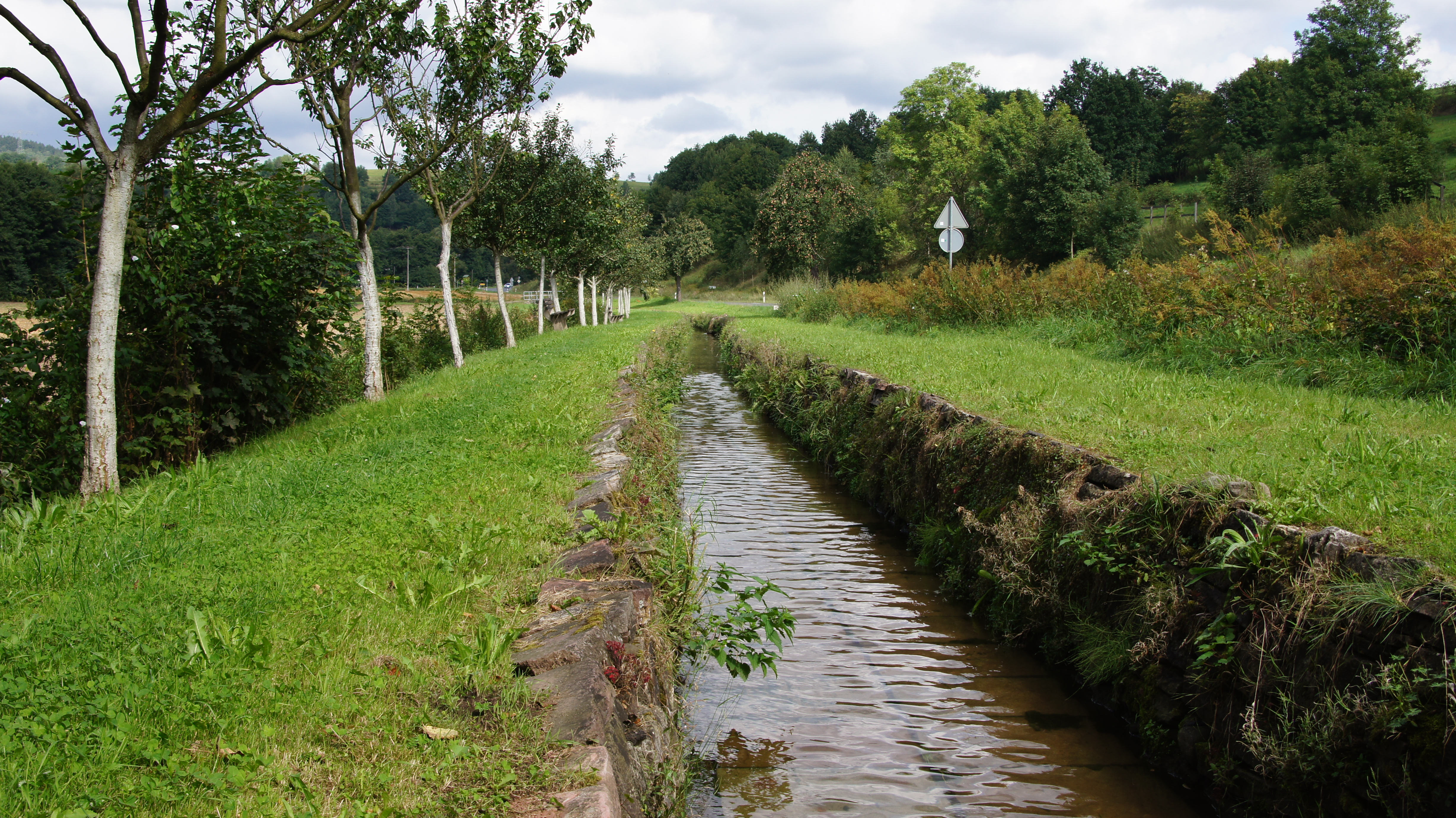 Der Kunstgraben (Blickrichtung gegen den Wasserlauf) zur Hochofenanlage "Neue Hütte" - Schmalkalden, Thüringen, Deutschland